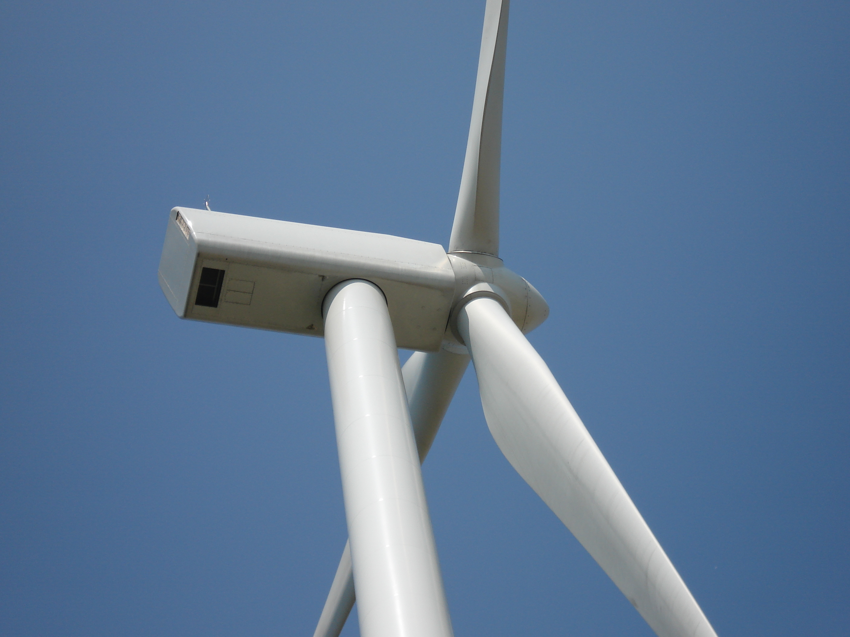 Eén van de vier windturbines uit Lanaken (2005) in closeup.